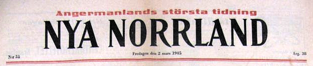 Tidningshuvudet på Nya Norrland, 2 mars 1945.